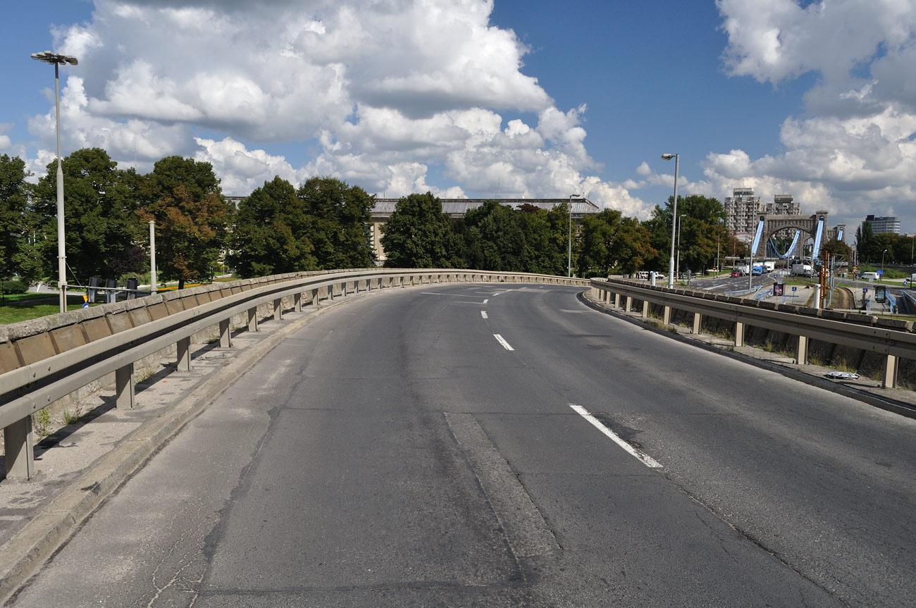 Estakada prowadząca do placu Wróblewskiego. Dziś można było sobie na jej szczycie zrobić grilla bo na moście Grunwaldzkim kręcili film ;)